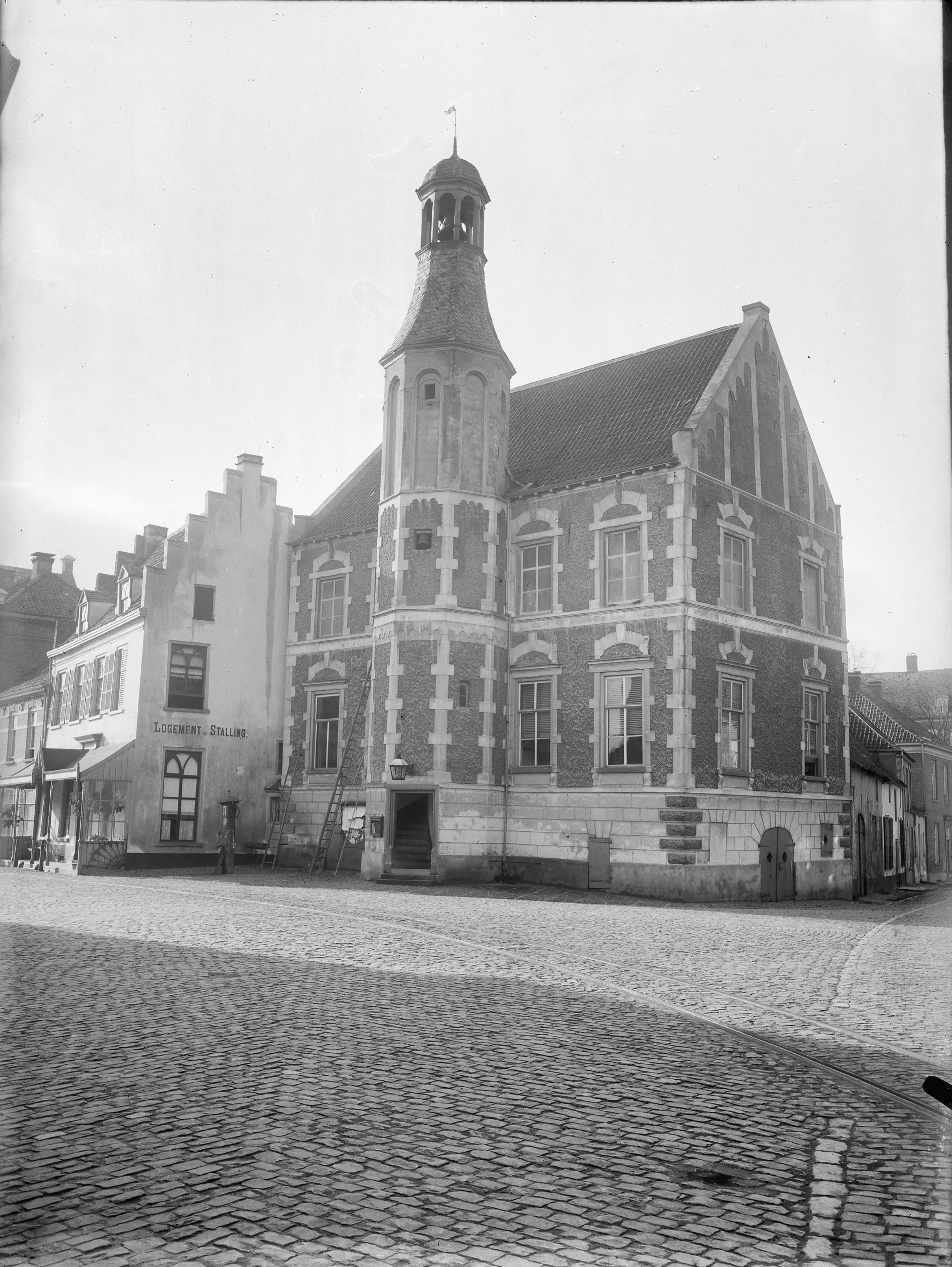 Raadhuis: exterieur